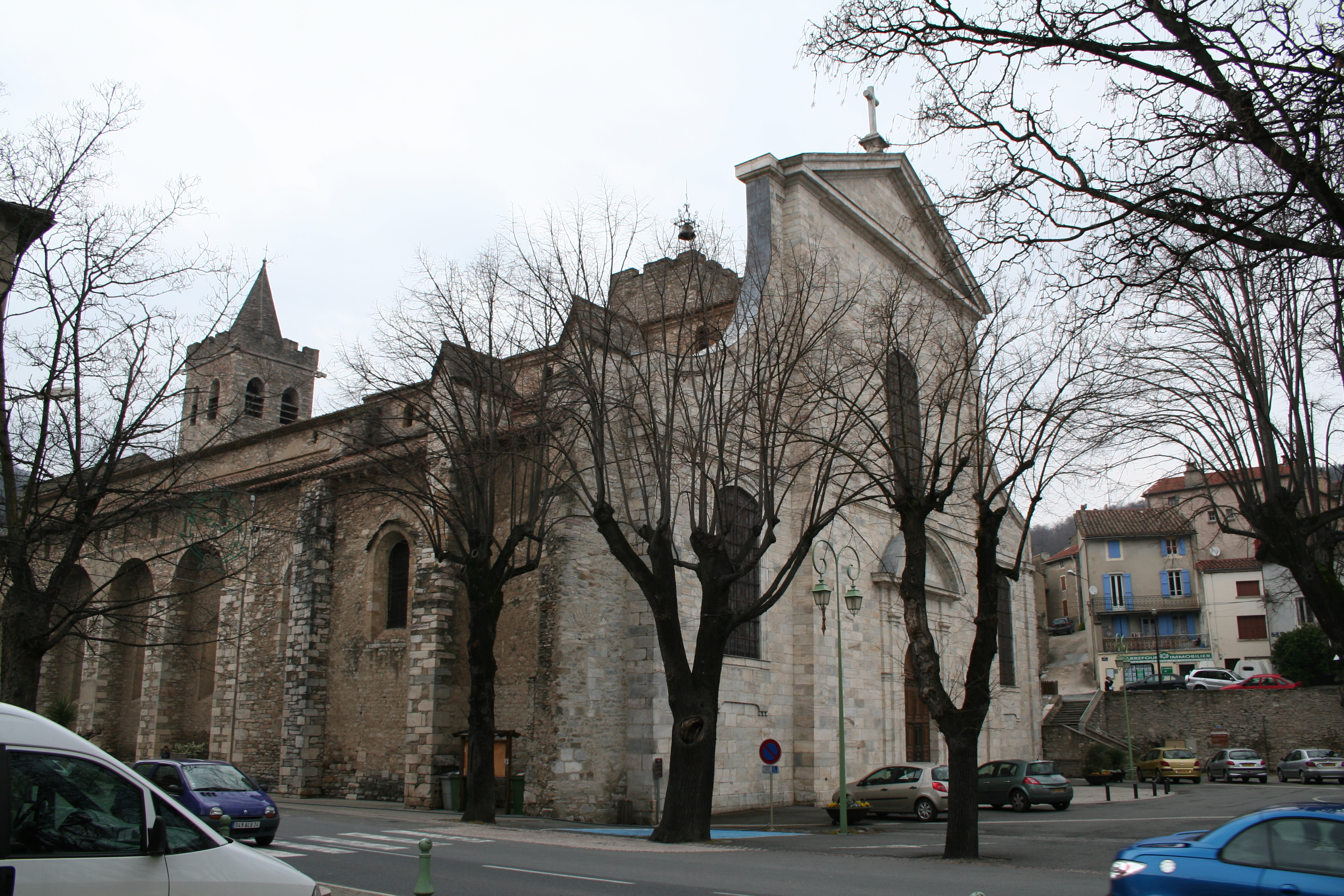 Saint-Pons-de-Thomières (Hérault)- cathédrale - mur méridional